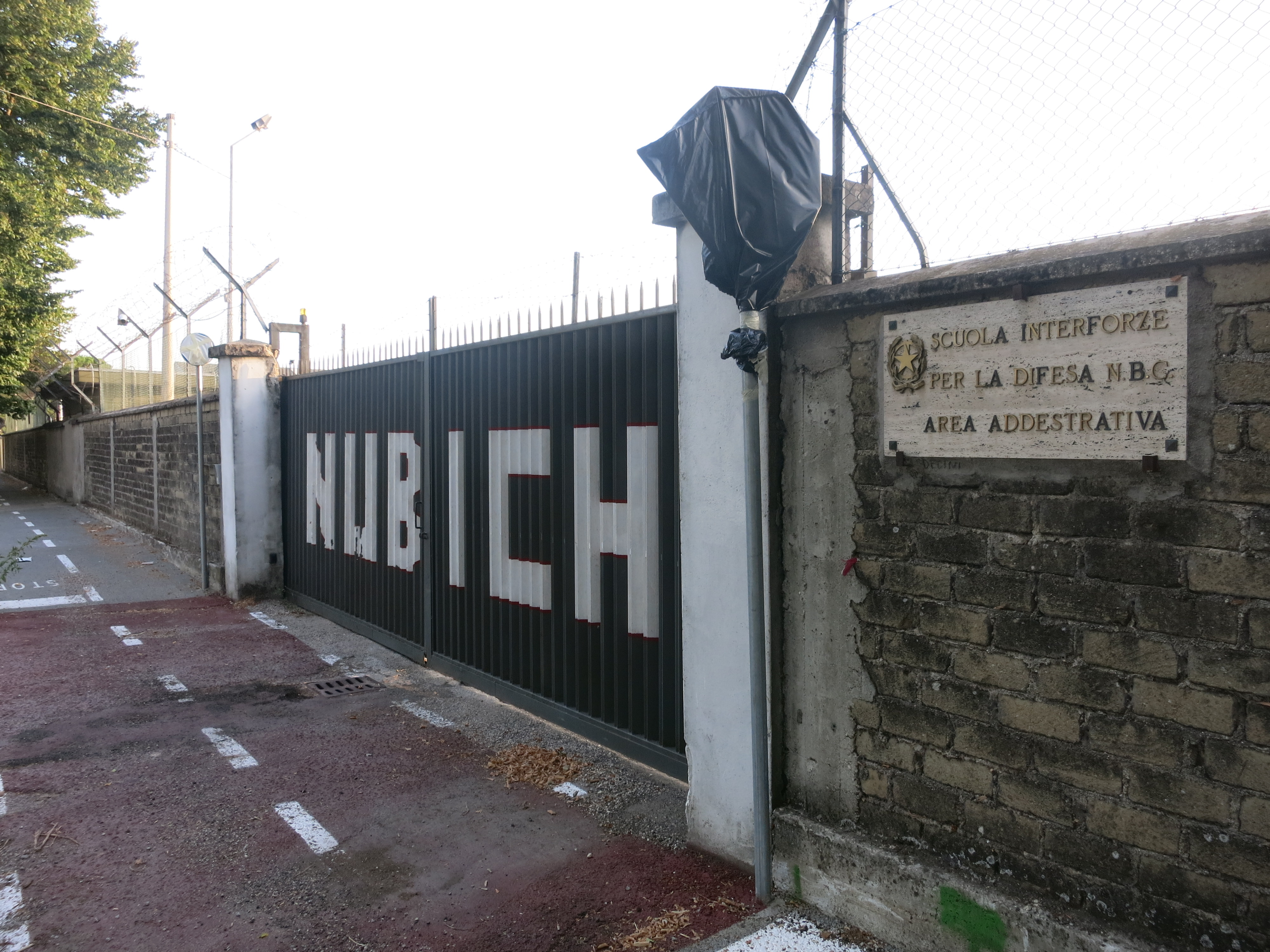 L'ingresso dell'aeroporto Ciuffelli di Rieti (Lazio), su viale Marco Curio Dentato, che conduce al centro di addestramento "NUBICH", utilizzato dagli allievi della Scuola Interforze per la Difesa NBC di Rieti per simulare scenari di contaminazione di una città con armi nucleari, batteriologiche o chimiche.